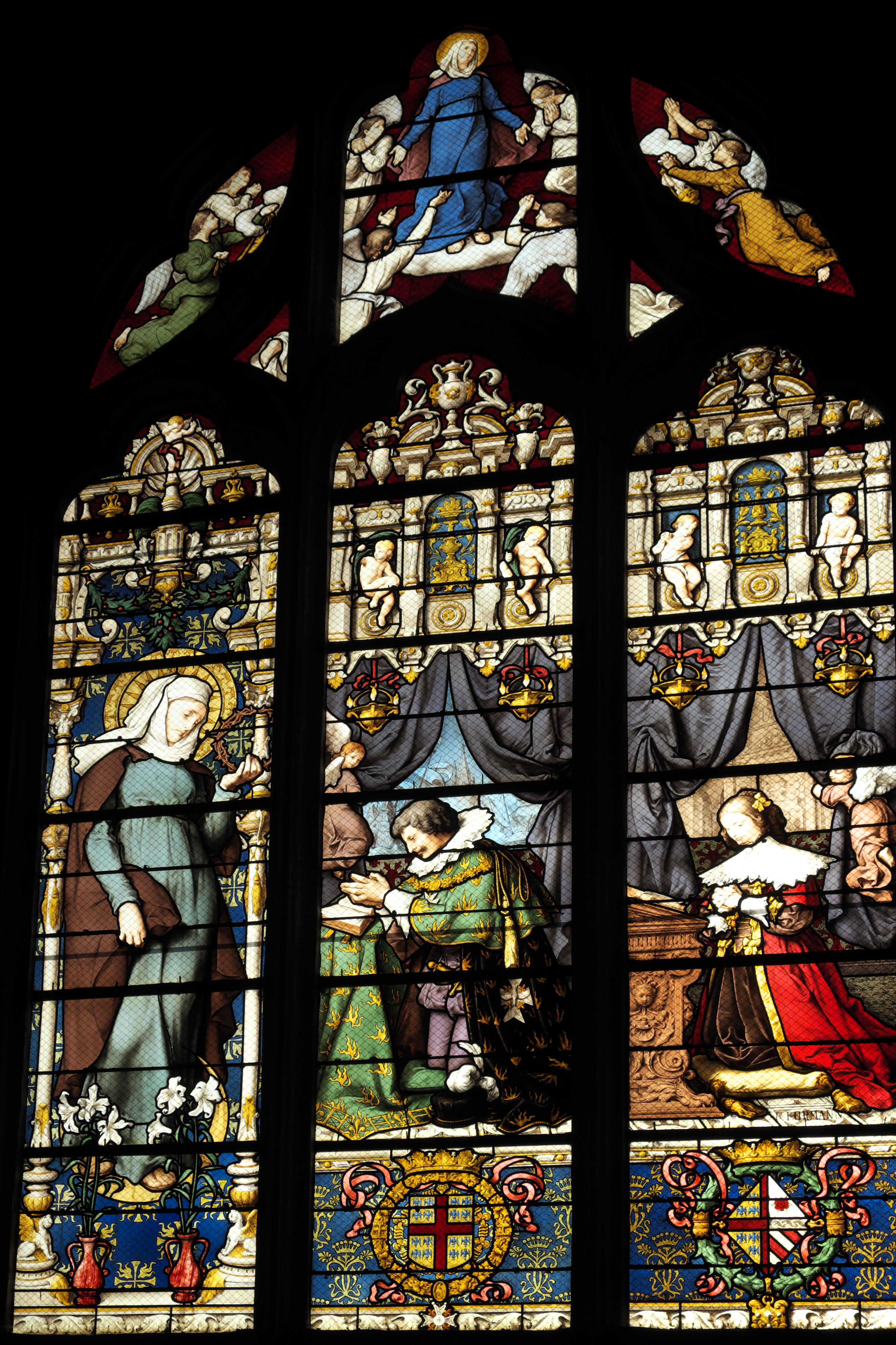 Katholische Pfarrkirche Saint-Martin (Collégiale Saint-Martin) in Montmorency, Bleiglasfenster aus dem 19. Jahrhundert; Darstellung: Henri II. de Montmorency (Mitte), seine Frau Marie-Félicie des Ursins (rechts), Madonna auf der Mondsichel mit Dornenkrone (links) (siehe: Dominique Foussard, Charles Huet, Mathieu Lours: Églises du Val-d'Oise. Pays de France, Vallée de Montmorency. Société d'Histoire et d'Archéologie de Gonesse et du Pays de France, 2. Auflage, Gonesse 2011, ISBN 9782953155426)